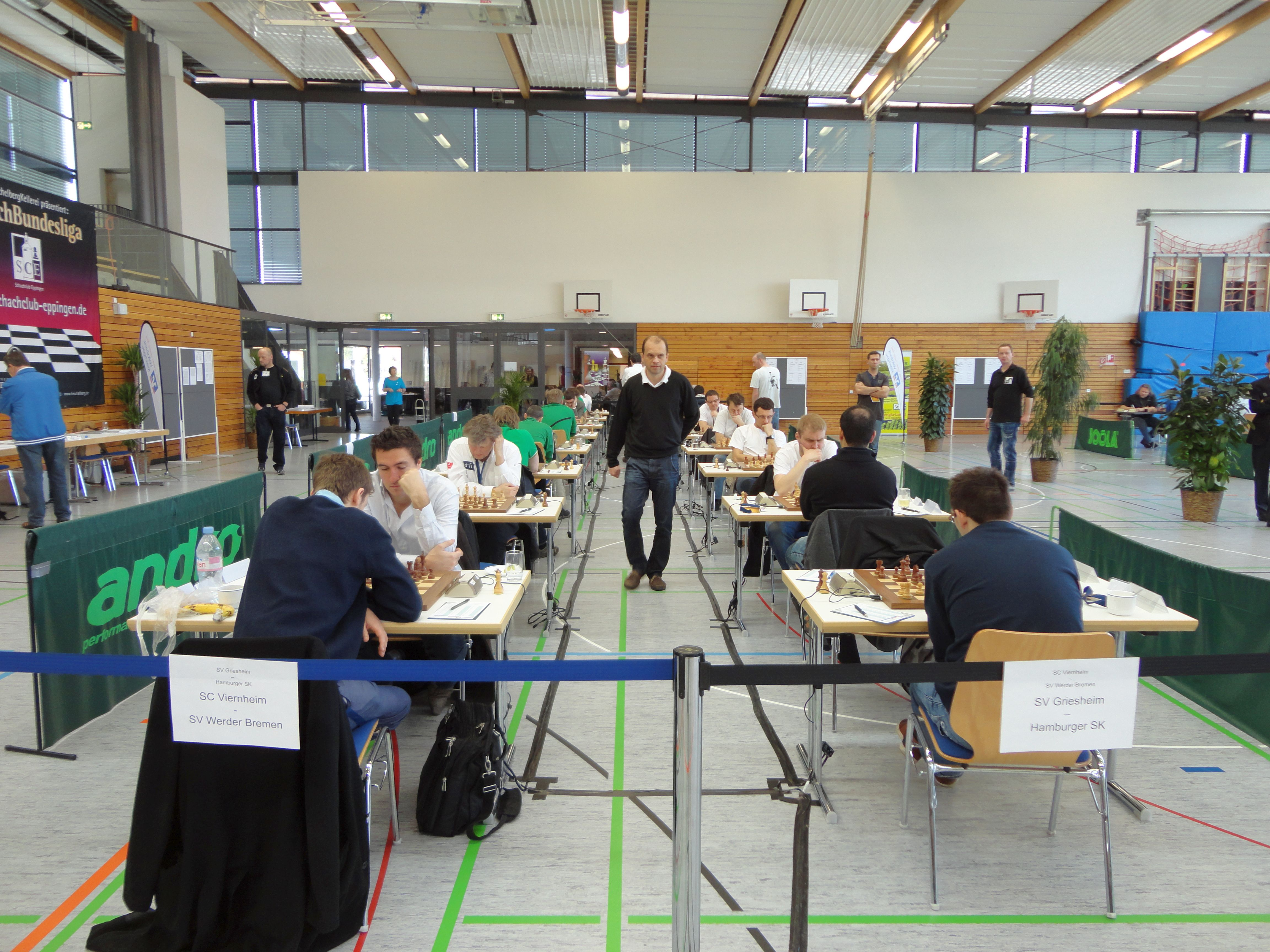 SC Viernheim - Werder Bremen und SV Griesheim - Hamburger SK, Finale der Deutschen Schachbundesliga Saison 2013/2104 in der Hardwaldhalle Eppingen.